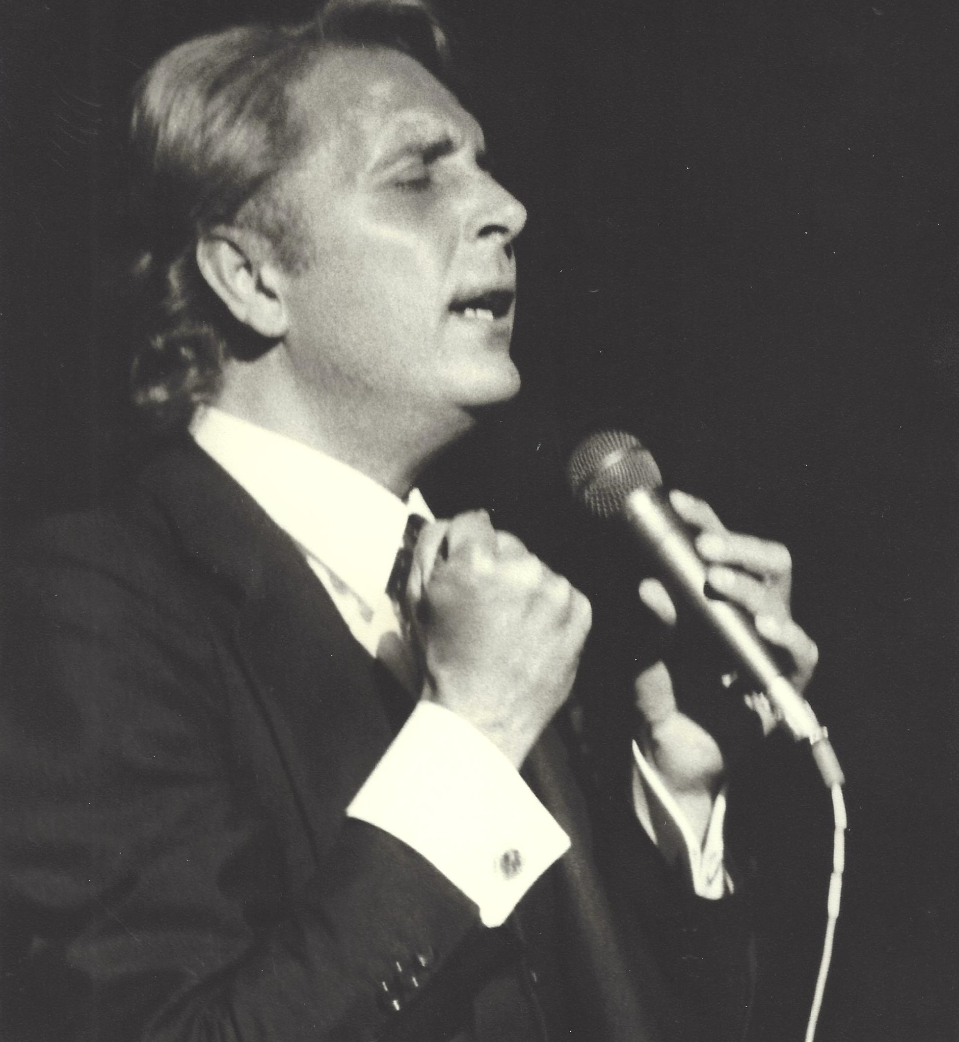 Jaime Actuación en concierto